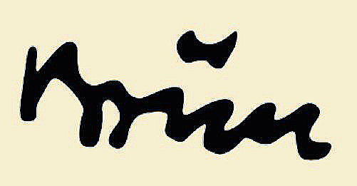 Signature von Theodor Brün